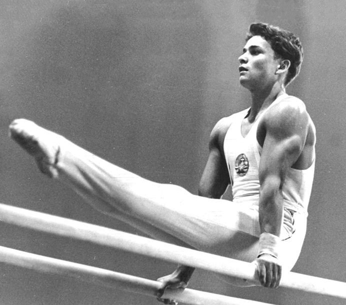 Zentralbild Ko-Ki 4.8.1963 Internationales Turnier im Geräteturnen in Leipzig. Ein internationales Turnier im Geräteturnen wurde am 4. August 1963 in der Messehalle 2 in Leipzig durchgeführt. Die Wettkämpfe mit Turnern aus der CSSR, der UdSSR, aus Dänemark, Norwegen, Großbritannien, Polen, Rumänien, und Ungarn fanden vor 4700 Zuschauern,darunter zahlreiche internationale Ehrengäste des IV. Deutschen Turn- und Sportfestes statt. UBz.: Klaus Köste (DDR), der Sieger des internationalen Kür-Sechskampfes bei seiner Kür am Barren.